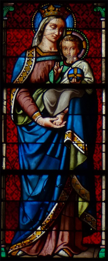 Vierge à l'enfant - Eglise Saint-Gervais et Saint-Protais - Brion (Maine et Loire)